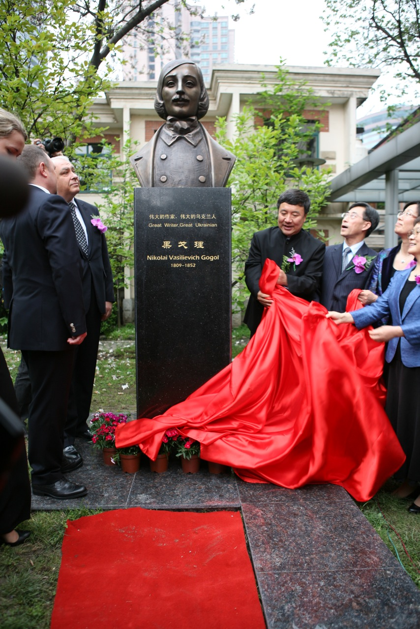 Памятник М.В.Гоголю в м.Шанхай (Китай)